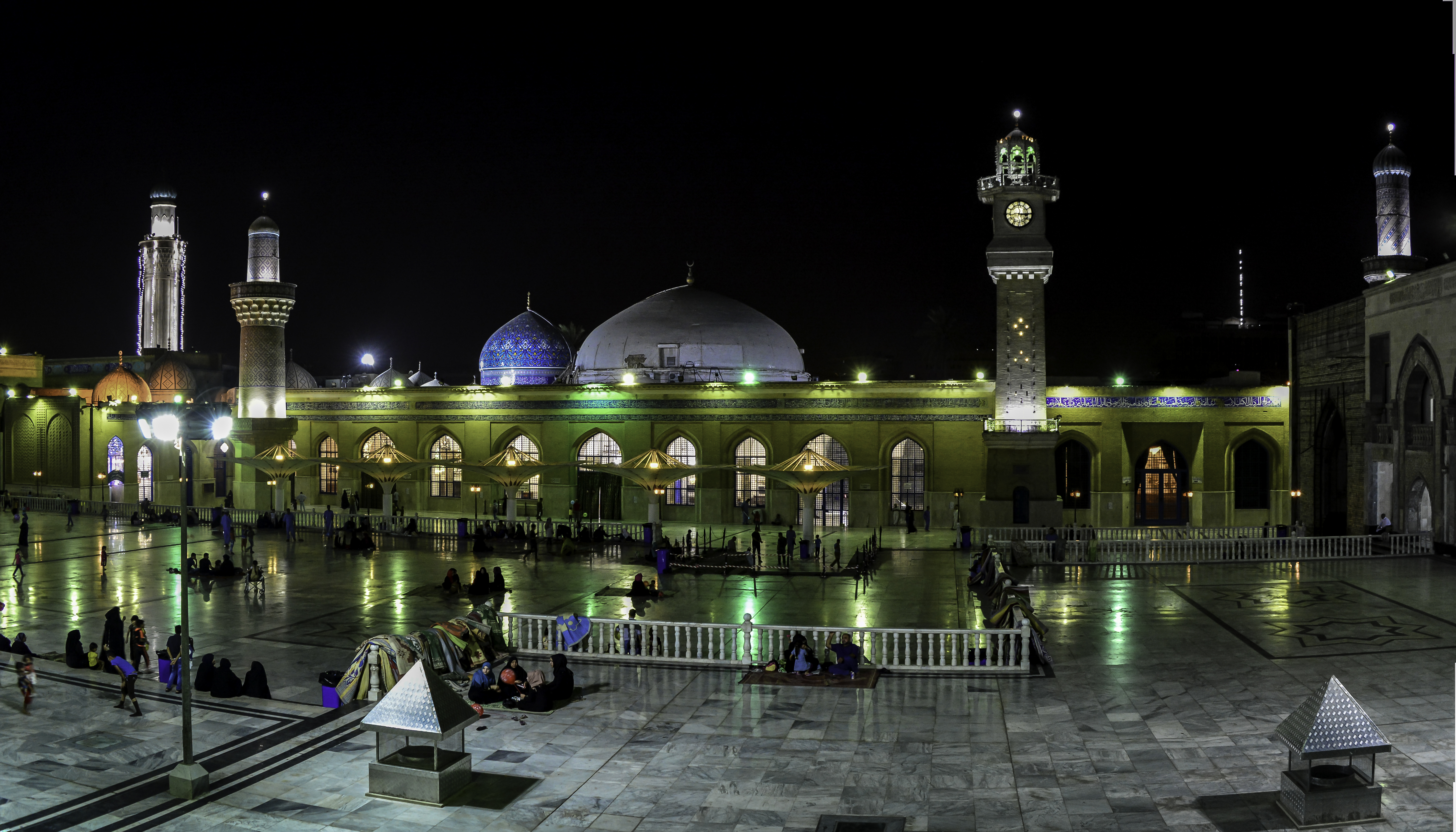 الحضرة القادرية هي التسمية التي تطلق على ضريح الشيخ عبد القادر الجيلاني الحسني في بغداد، يقع ضريح ومسجد الشيخ عبد القادر الجيلاني في منطقة باب الشيخ من جهة الرصافة من بغداد